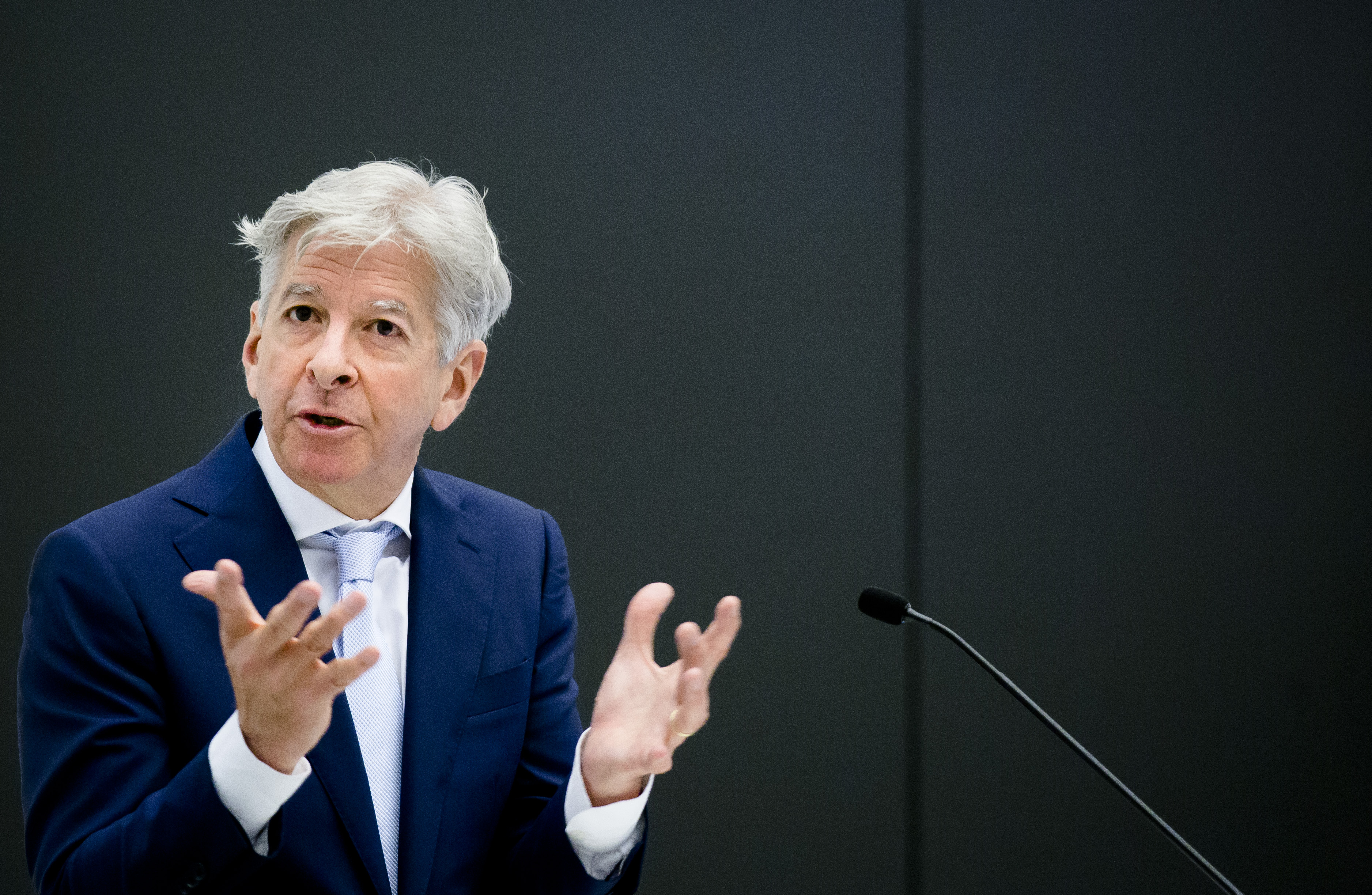 _MAA8268